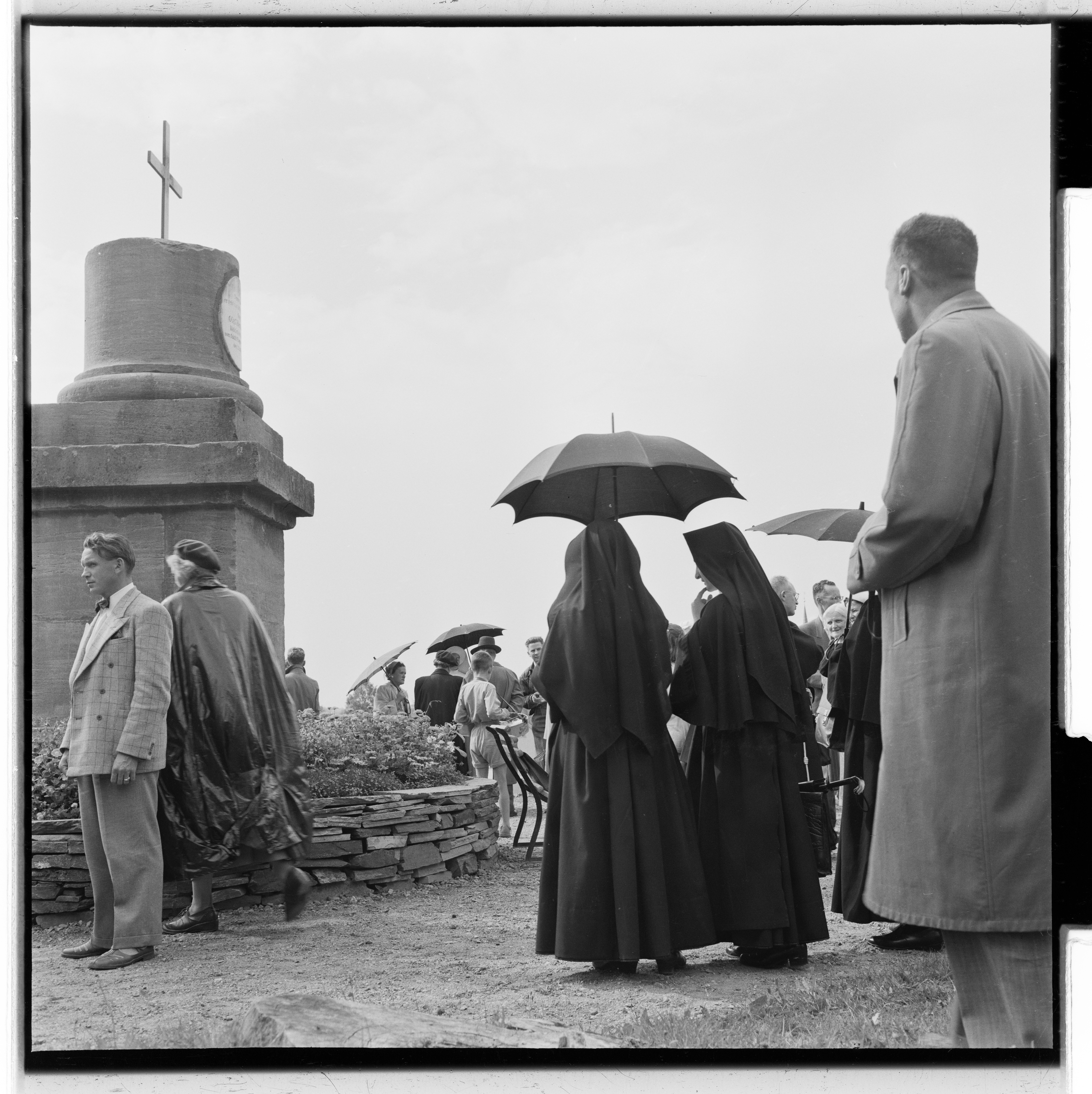 Bildet er hentet fra Arkivverket. Katolsk kirkefest i Trondheim. NÅ nr. 17, 1953. Tilstede var blant andre Kardinal Griffin, katolsk biskop Mangers, katolsk bisko Rüth, munker, nonner, Stiklestad kirke Nidarosdomen. Arkivinstitusjon : Riksarkivet Arkivnavn : Billedbladet NÅ Sted : Norge, Sør-Trøndelag, Trondheim, Avbildet